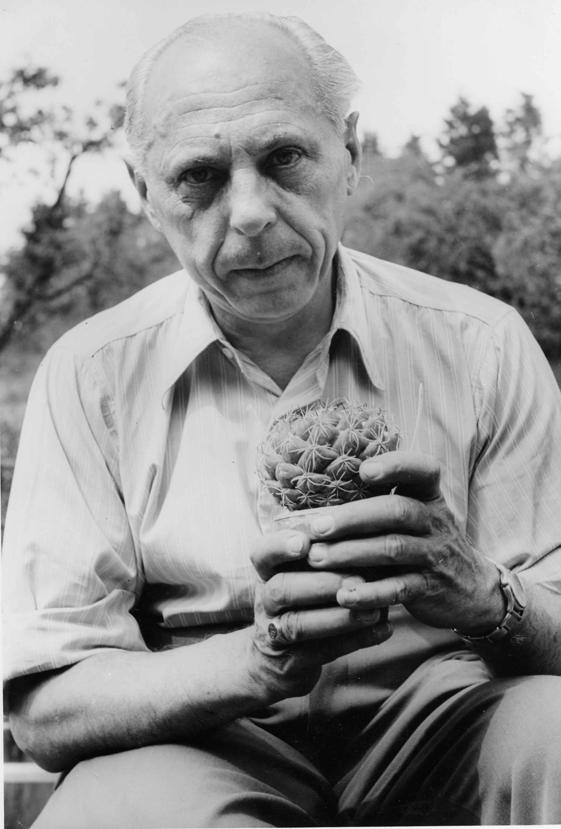 Wilhelm Andreae im Jahr 1959 mit einem Exemplar von Coryphantha andreae in Händen